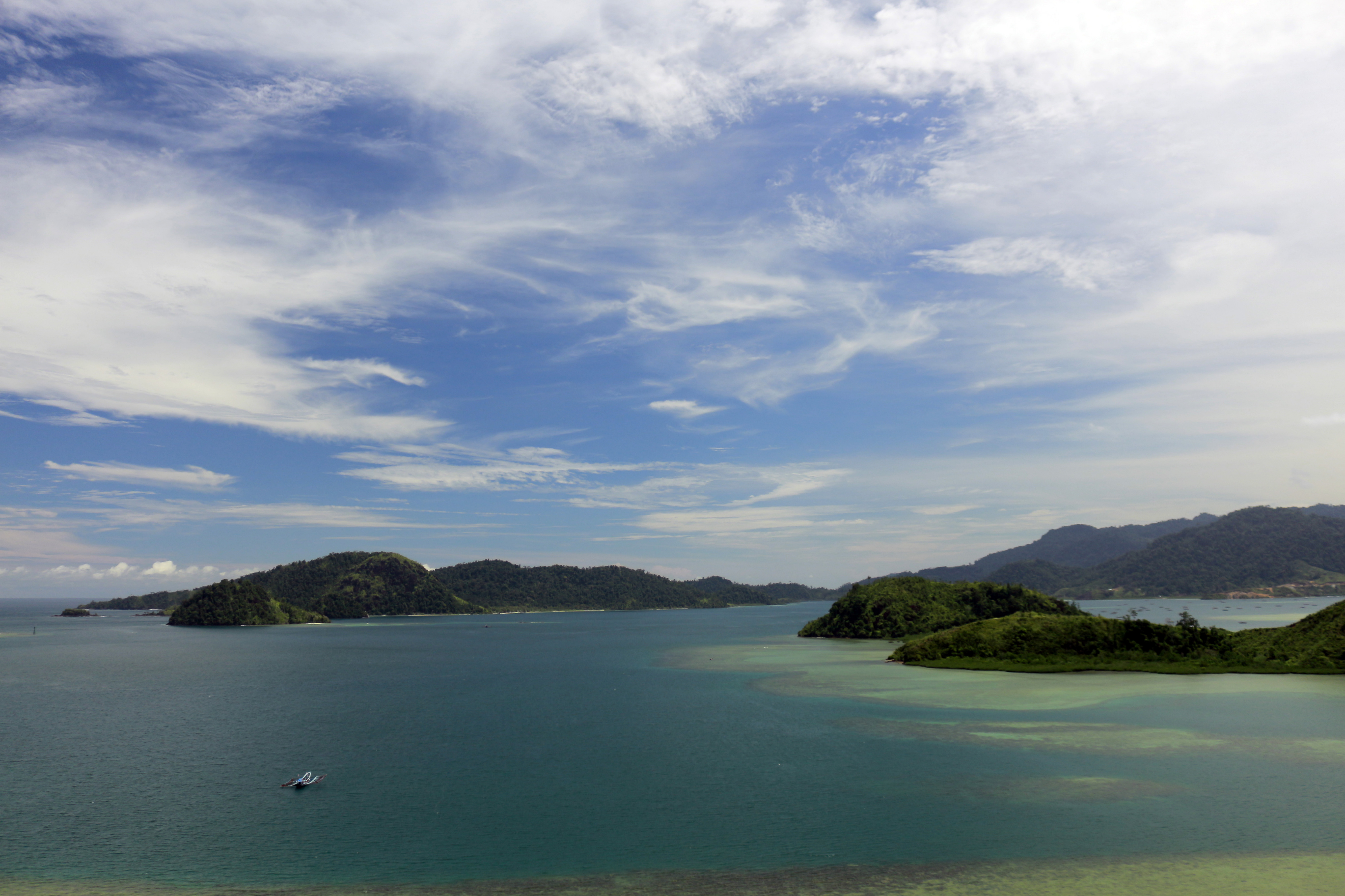 Mandeh merupakan kawasan wisata yang terletak di Kecamatan Koto XI Tarusan, Pesisir Selatan dan berbatas langsung dengan Kota Padang. Kawasan yang berjarak 56 km dari Padang dengan Luas ± 18.000 ha ini sudah dikenal baik di tingkat nasional maupun Internasional, terlebih lagi dengan adanya investasi dari investor asal italia untuk mengembangkan resort wisata yang dikenal dengan Cubadak Paradiso. Kawasan Mandeh telah menjadi destinasi utama kebijakan sektor pariwisata kebaharian yang dimasukkan kedalam Rencana Induk Pengembangan Pariwisata Nasional (RIPPNAS) bersama Biak dan Bunaken. Kawasan Wisata Mandeh sangat menjanjikan untuk dijadikan tujuan investasi, bahkan baru - baru ini pun Raja Salman juga berencana berinvestasi di sana. Lautan yang tenang karena berada di dalam teluk, terumbu karang yang masih terjaga, menjadi pesonanya sendiri yang membuat banyak pengunjung, akademisi bahkan peneliti biota laut untuk datang dan berkunjung ke sana.